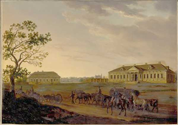 Беларуская (тарашкевіца): Бачэйкаў (Bačejkaŭ), сядзіба Цеханавецкіх (Ciechanaviecki)